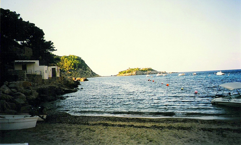 Platja del port de Sant Miquel de Balansat, a Eivissa